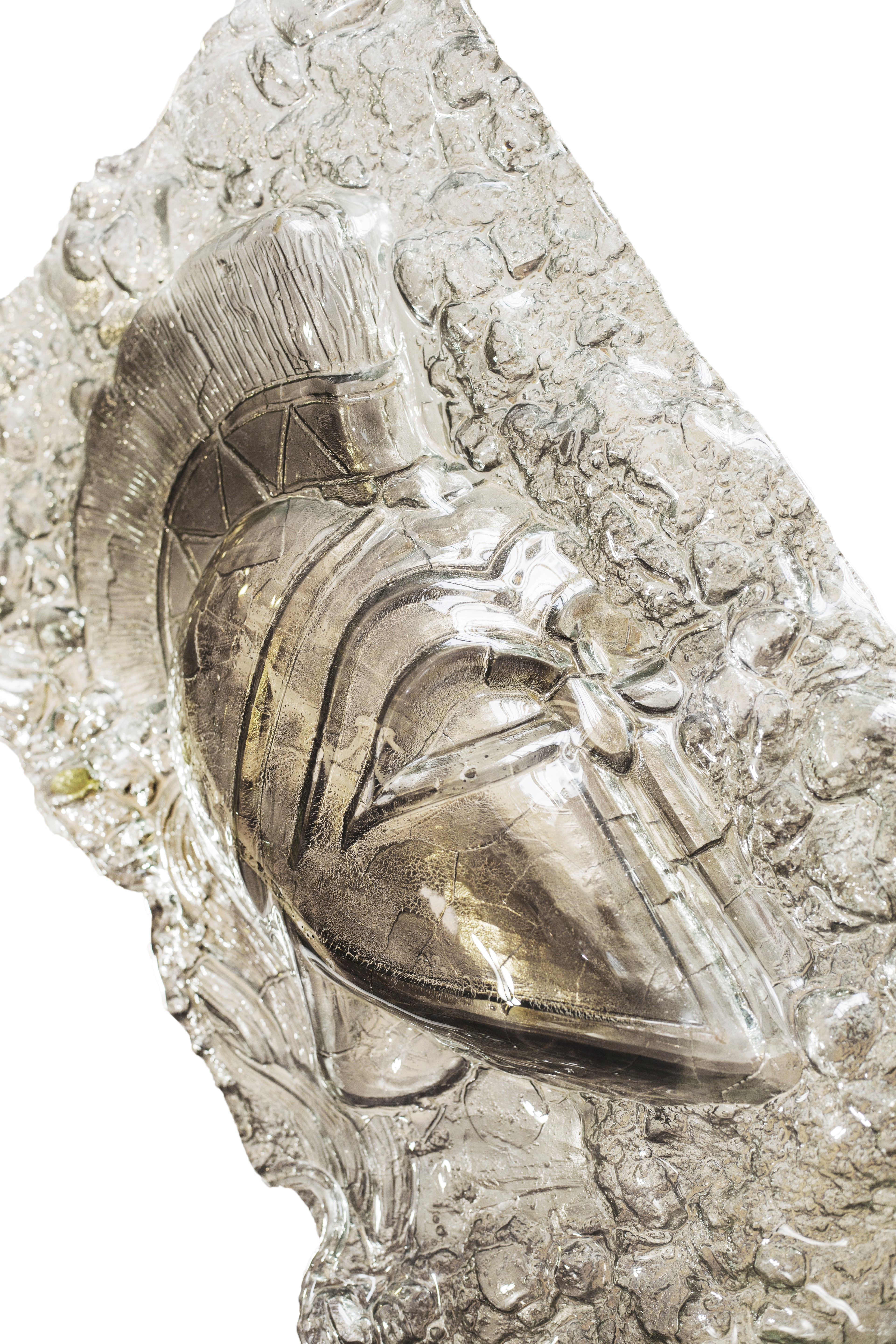 technika líhaného skla-fusing